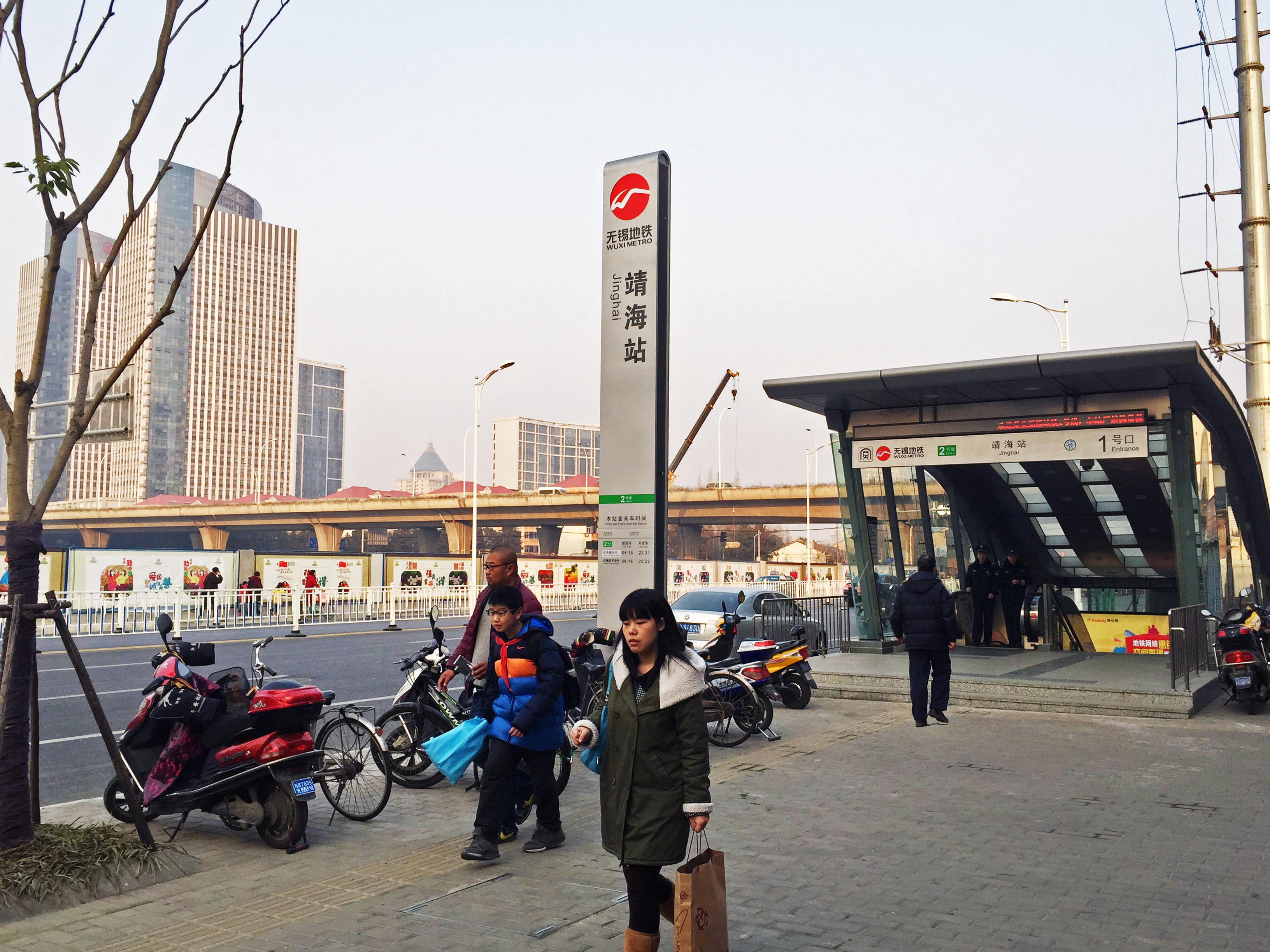 無錫地鐵靖海站1號出入口